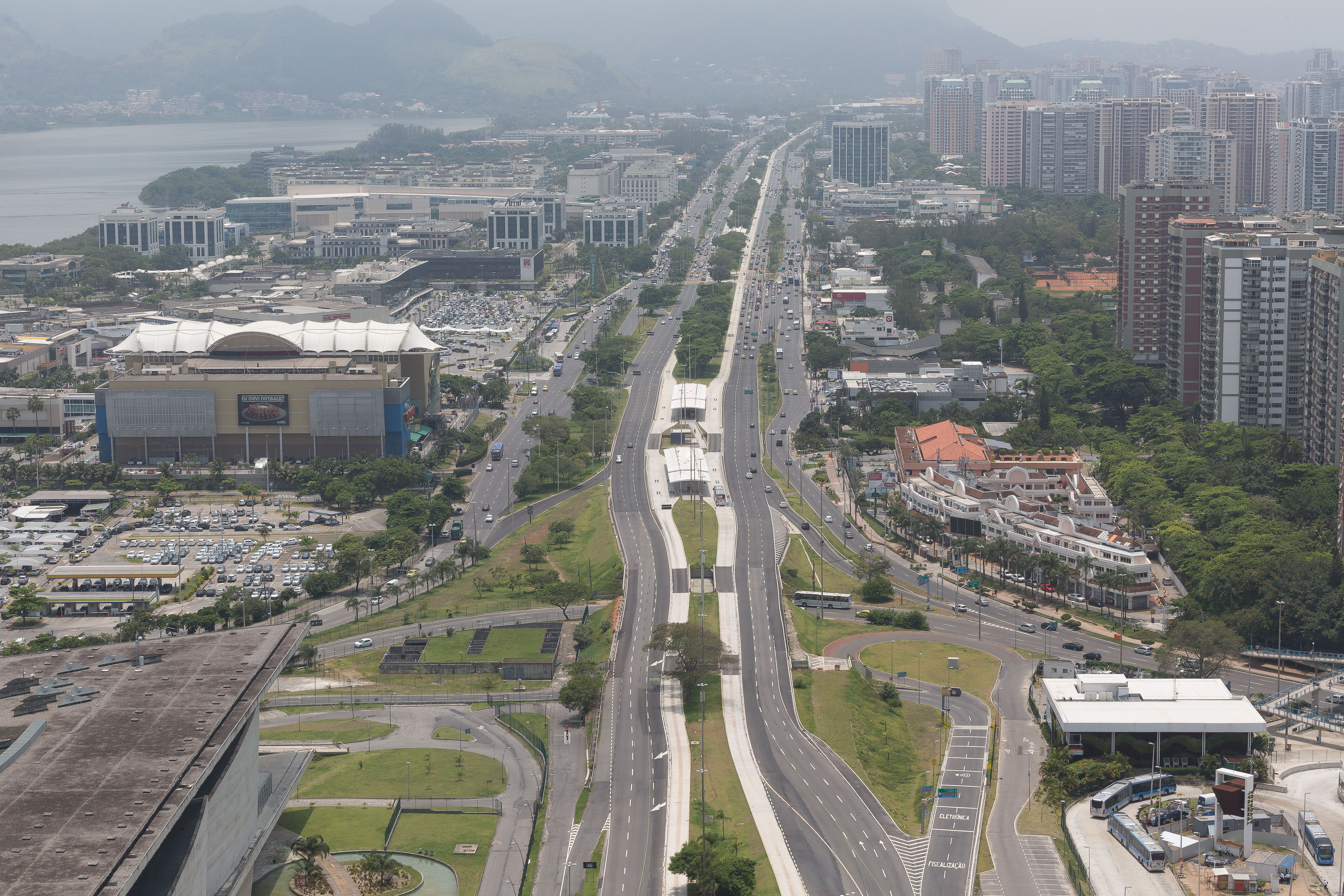 Vista aérea da pista principal no bairro da Barra d Tijuca na cidade do Rio de Janeiro.